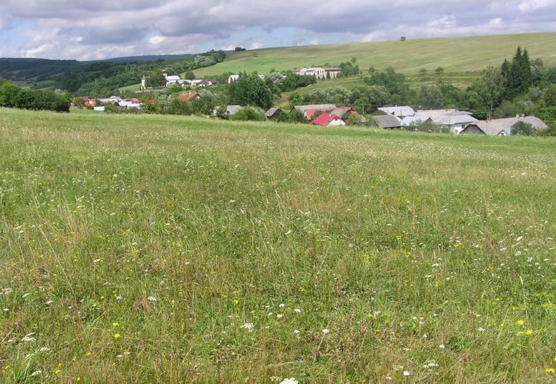 Celkový pohľad